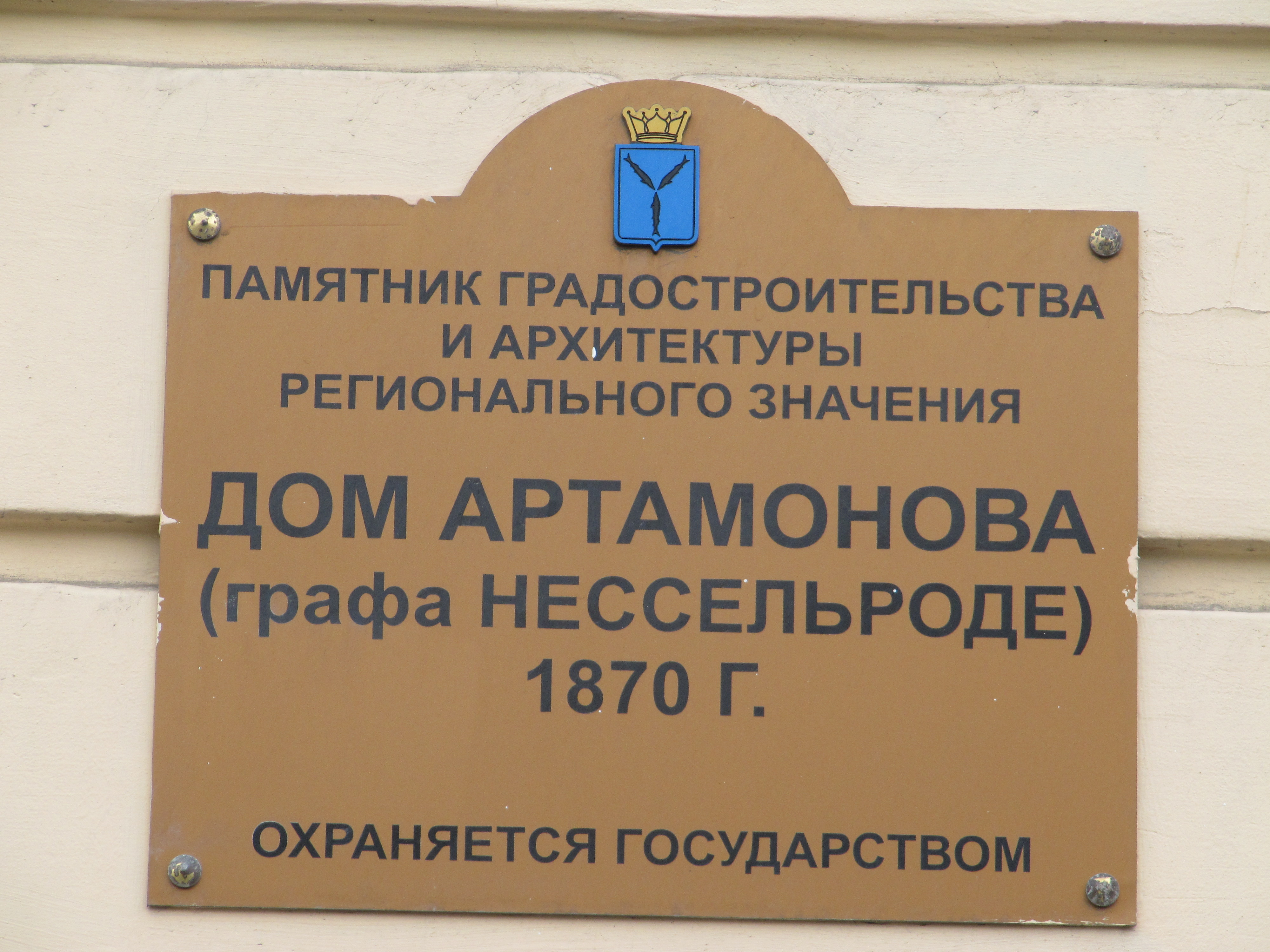 Дом Артамонова(графа Нессельроде), ул Московская 41. Саратов.1870 г.